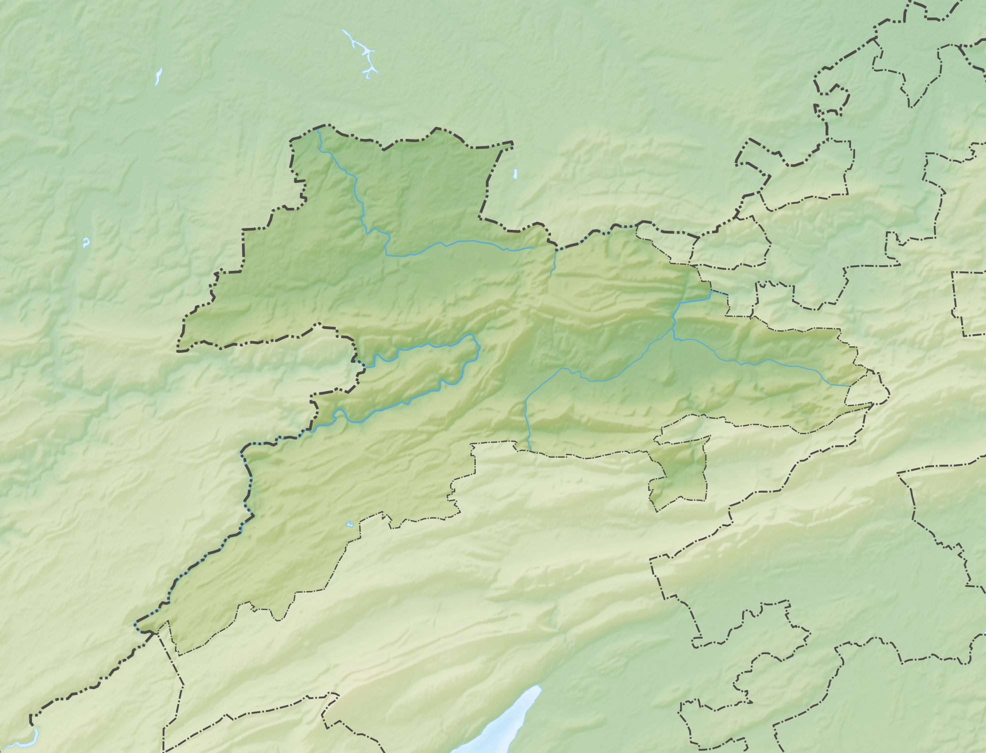 Reliefkarte des Kantons Jura Topographischer Hintergrund: NASA Shuttle Radar Topography Mission (public domain). SRTM3 v.2.